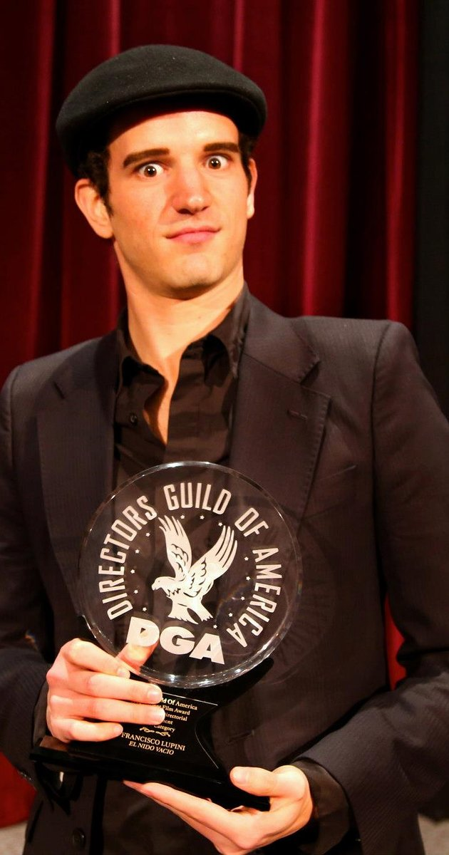 Francisco Lupini Basagoiti en los premios DGA 2012